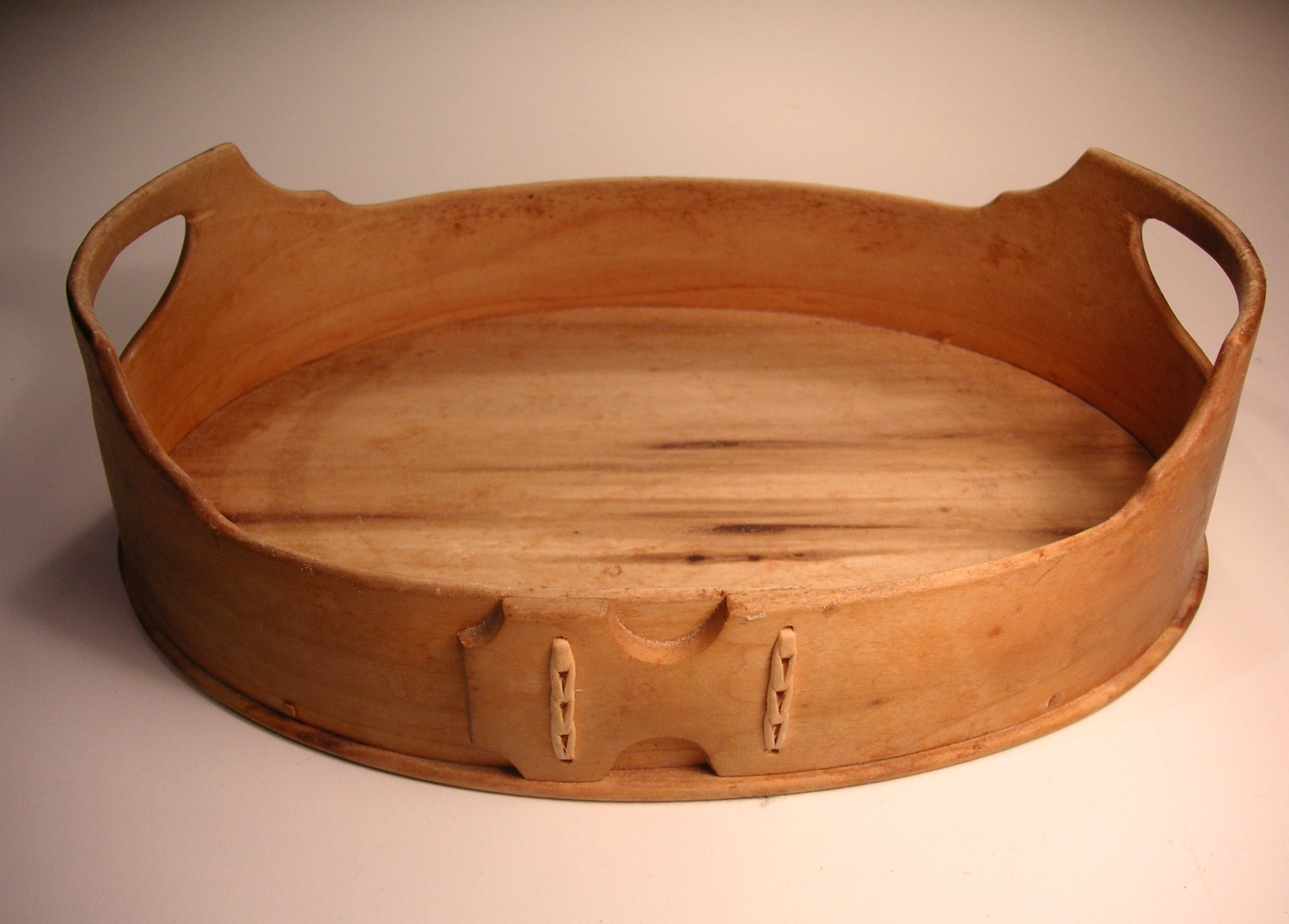 Svepask från Dalarna